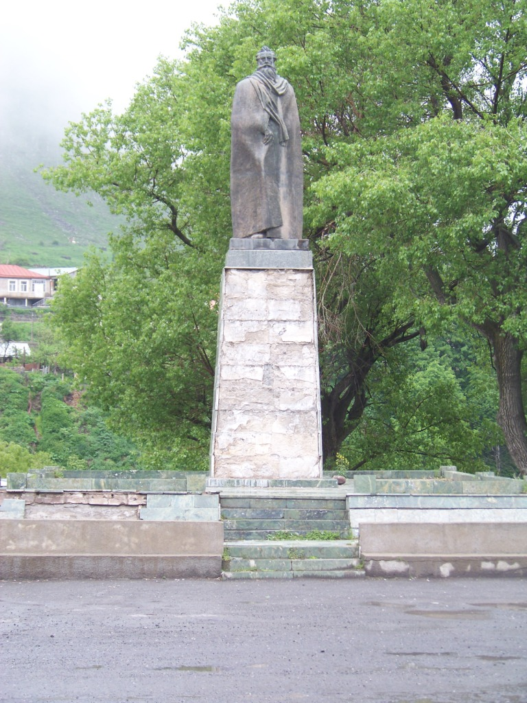 ალექსანდრე ყაზბეგის მონუმენტი დაბა სტეფანწმინდაში